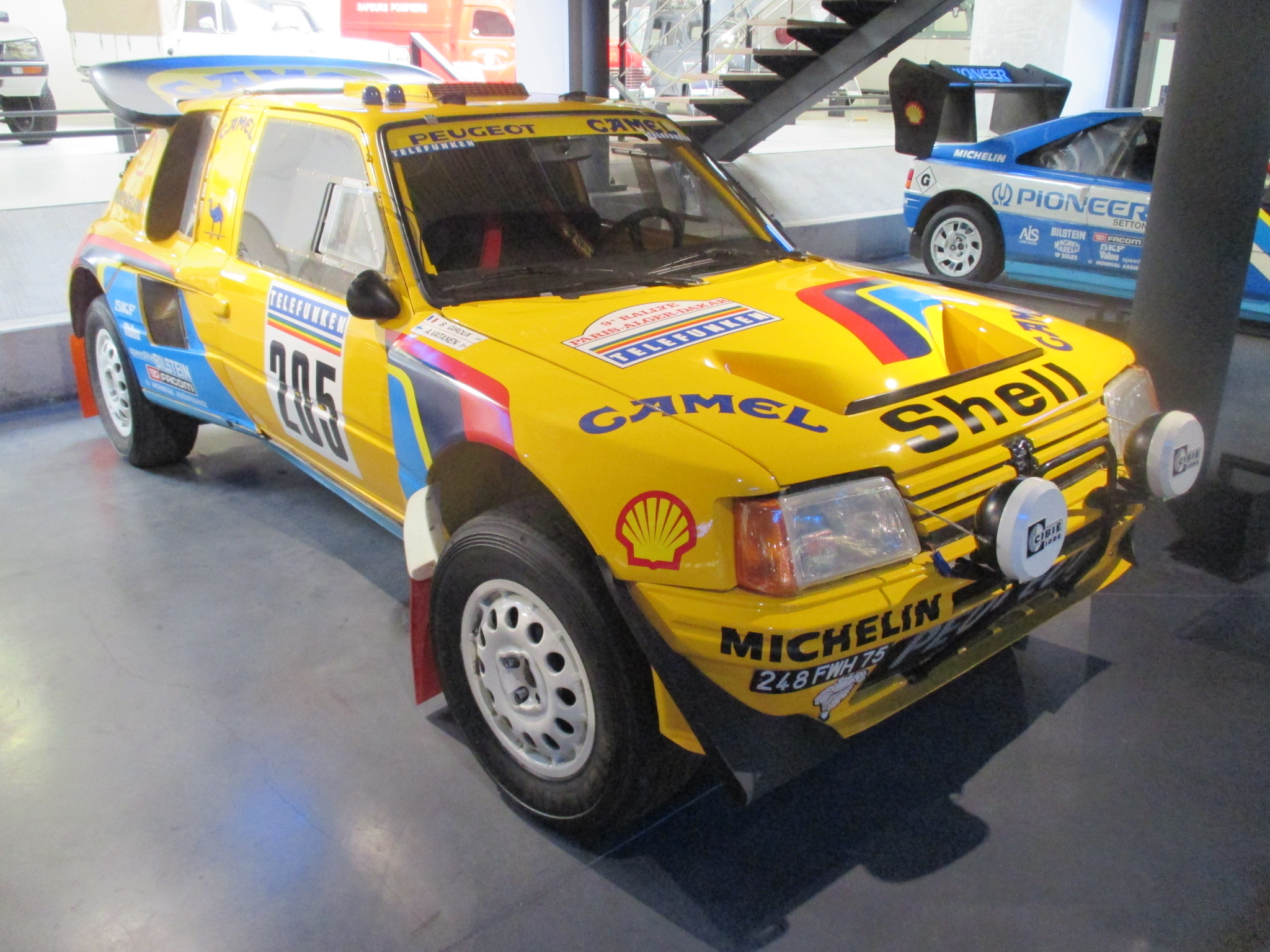 Peugeot 205 Turbo 16 Grand Raid Paris-Dakar - pilotée par Ari Vatanen, copilote Bernard Giroux - Musée de l'Aventure Peugeot de Sochaux.